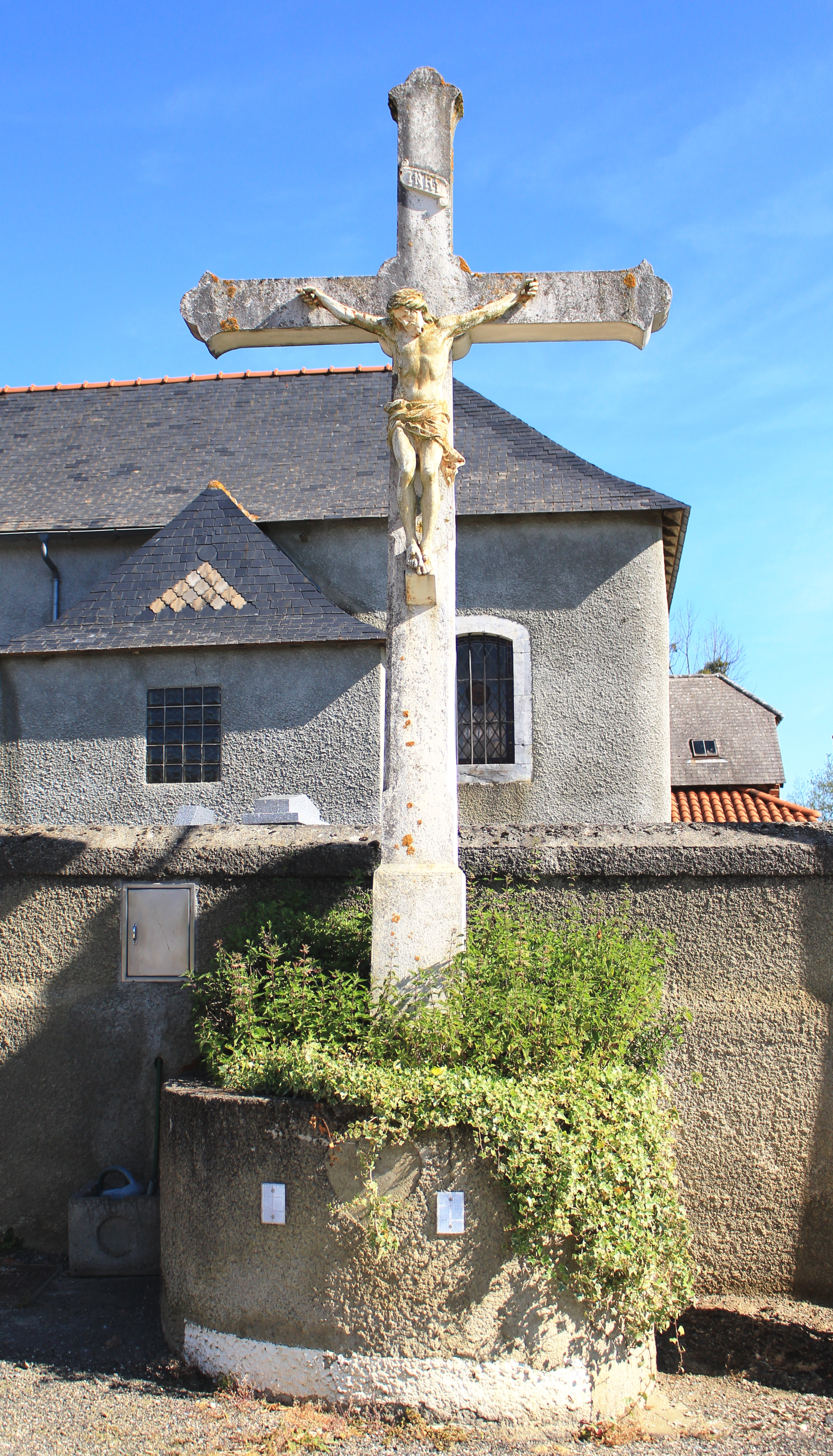 Croix de Lizos (Hautes-Pyrénées)